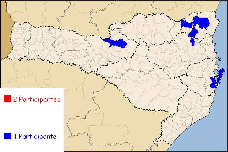 Mapa das cidades participantes do Campeonato Catarinense de Futebol Feminino 2008.